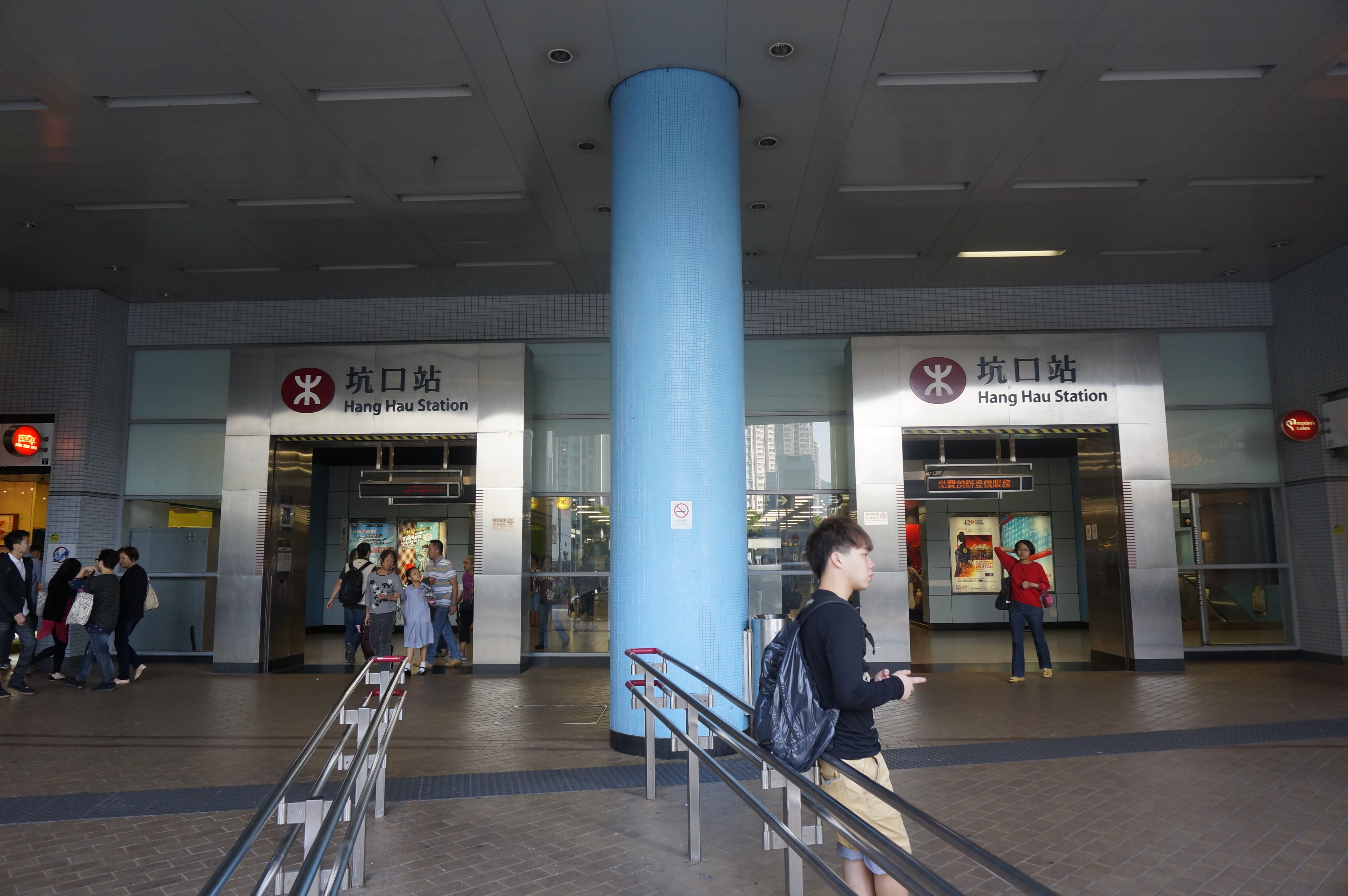 港鐵坑口站A出入口